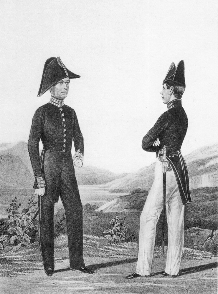 Гвардейский и Армейский Капельмейстеры, 1826-1852.